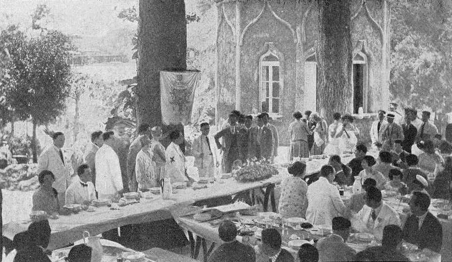 Fuco Gómez presenta a enseña de Hijos de Becerreá y su Comarca, fotografía en Vida Gallega 1927